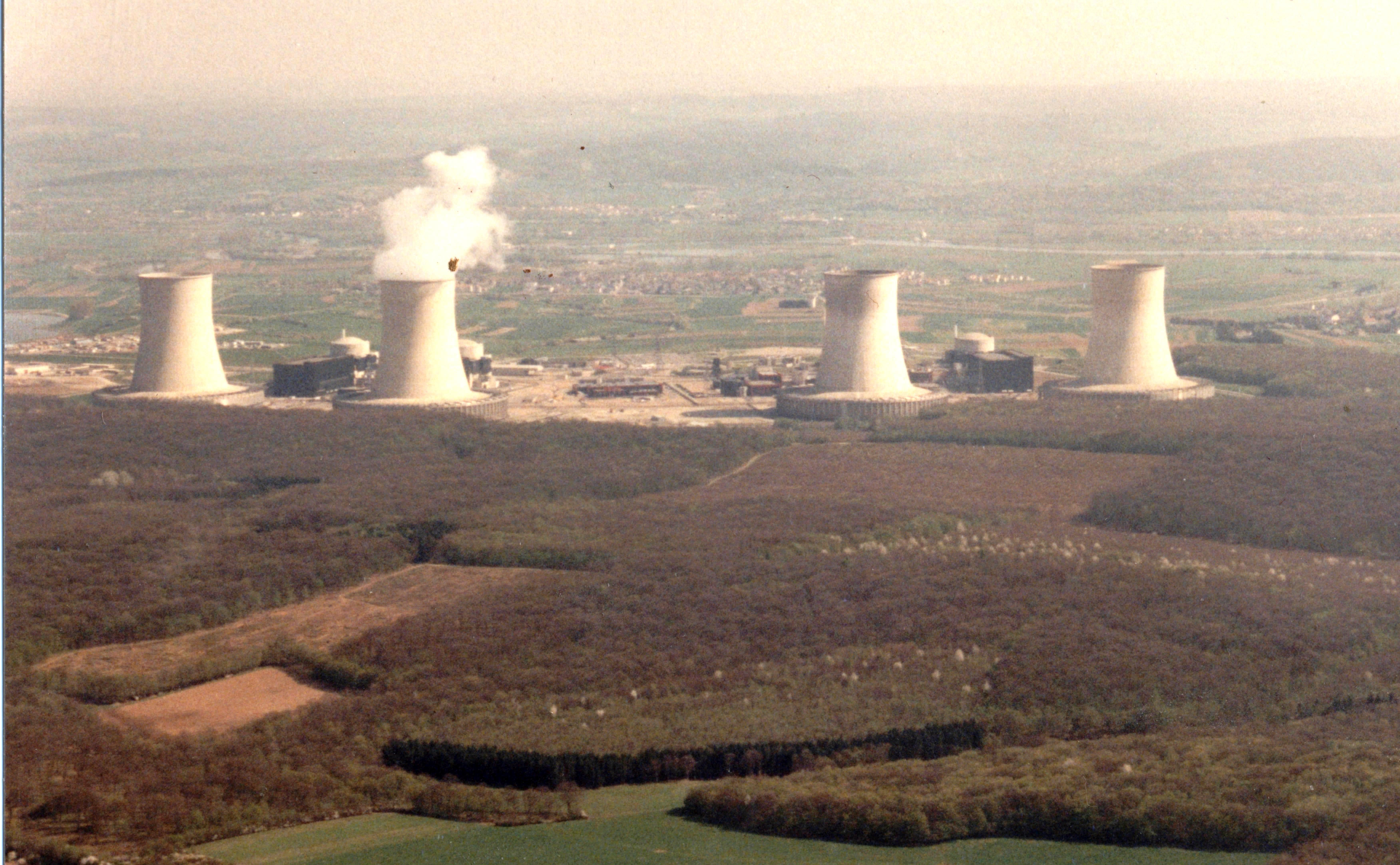 Cattenom Atomzentral 1991.